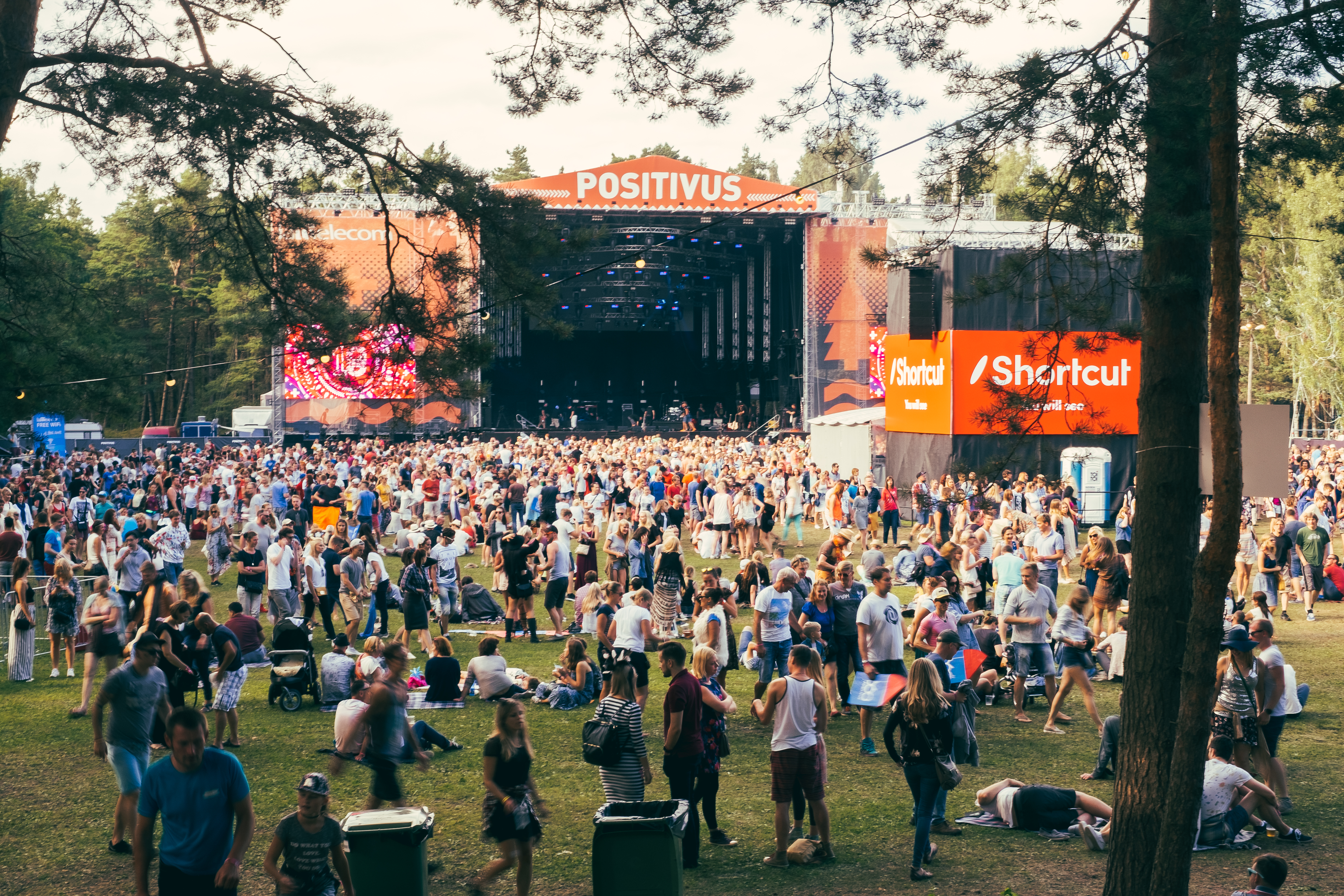 Positivus festival 2016